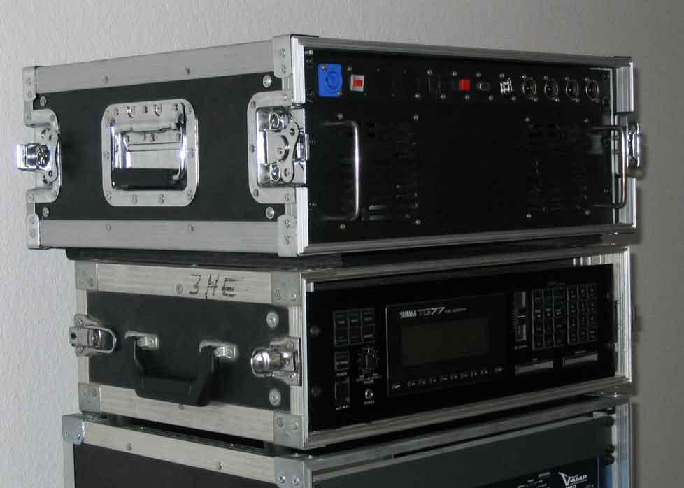 Flightcases für einzelne Geräte. Das untere Rack hat 3 HE und einfache Verschlüsse, das obere hat 4 HE und Butterflyverschlüsse sowie belastbare Tragegriffe. Wackernheim, den 25.08.2005